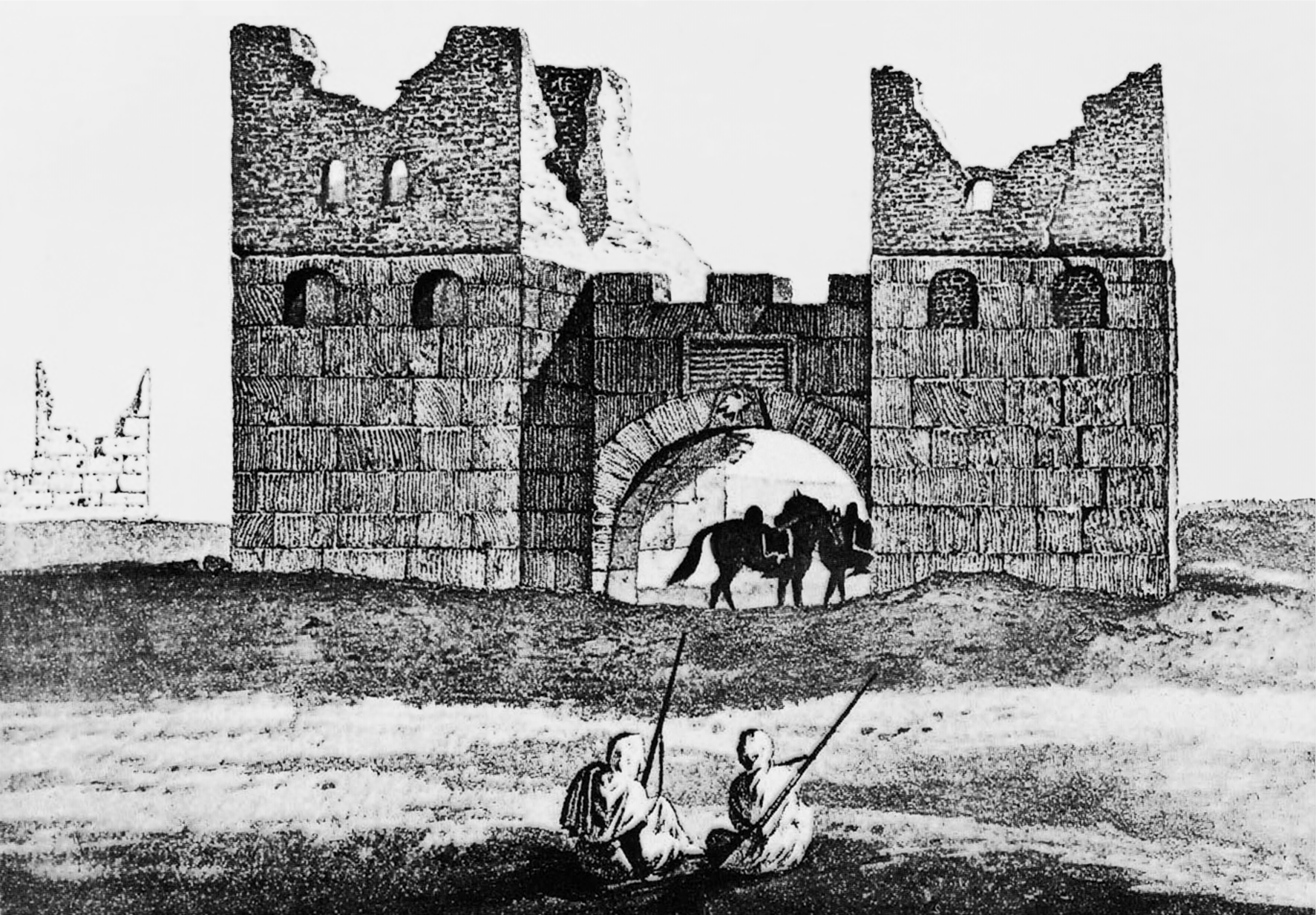 Kastell Gholaia/Bu Njem: Das Nordtor, das 1819 noch in einem ausgezeichneten Zustand erhalten war, gezeichnet von George Lyon